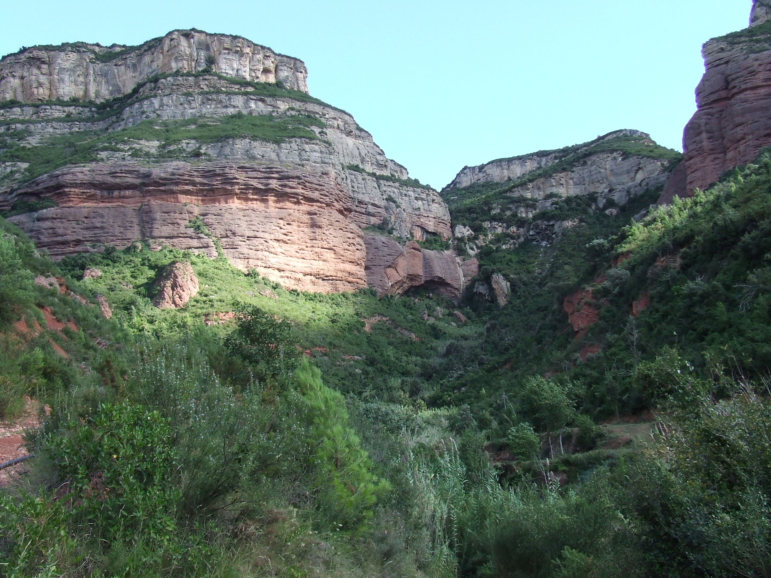 Naixement del torrent de Llòbrega (Riells del Fai, Bigues i Riells, Vallès Oriental)